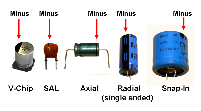 Polaritätskennzeichnung von Aluminium-Elektrolytkondensatoren